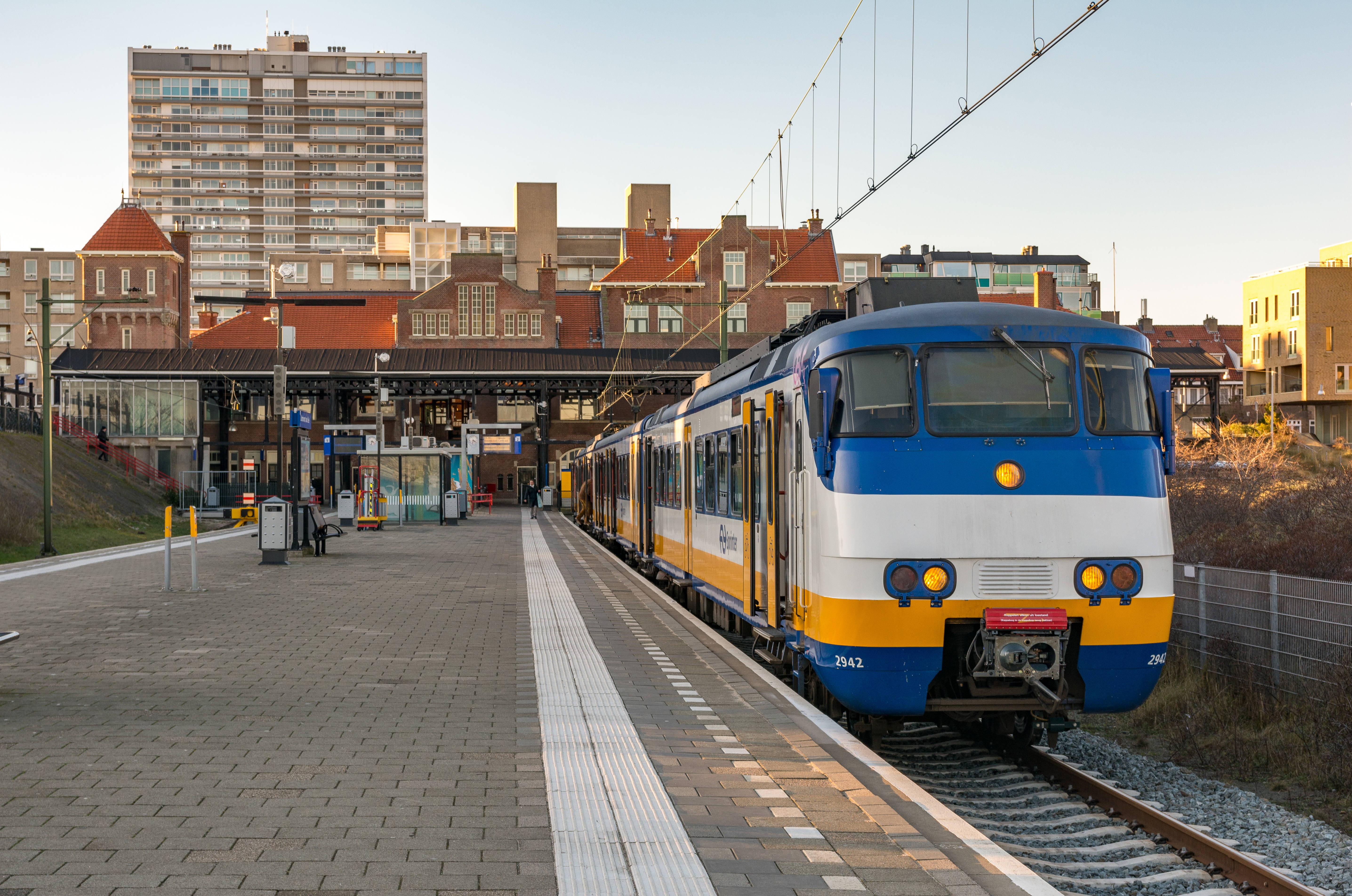 SGMm 2942 staat op station Zandvoort aan Zee klaar voor vertrek als Sprinter 5446 naar Amsterdam Centraal.